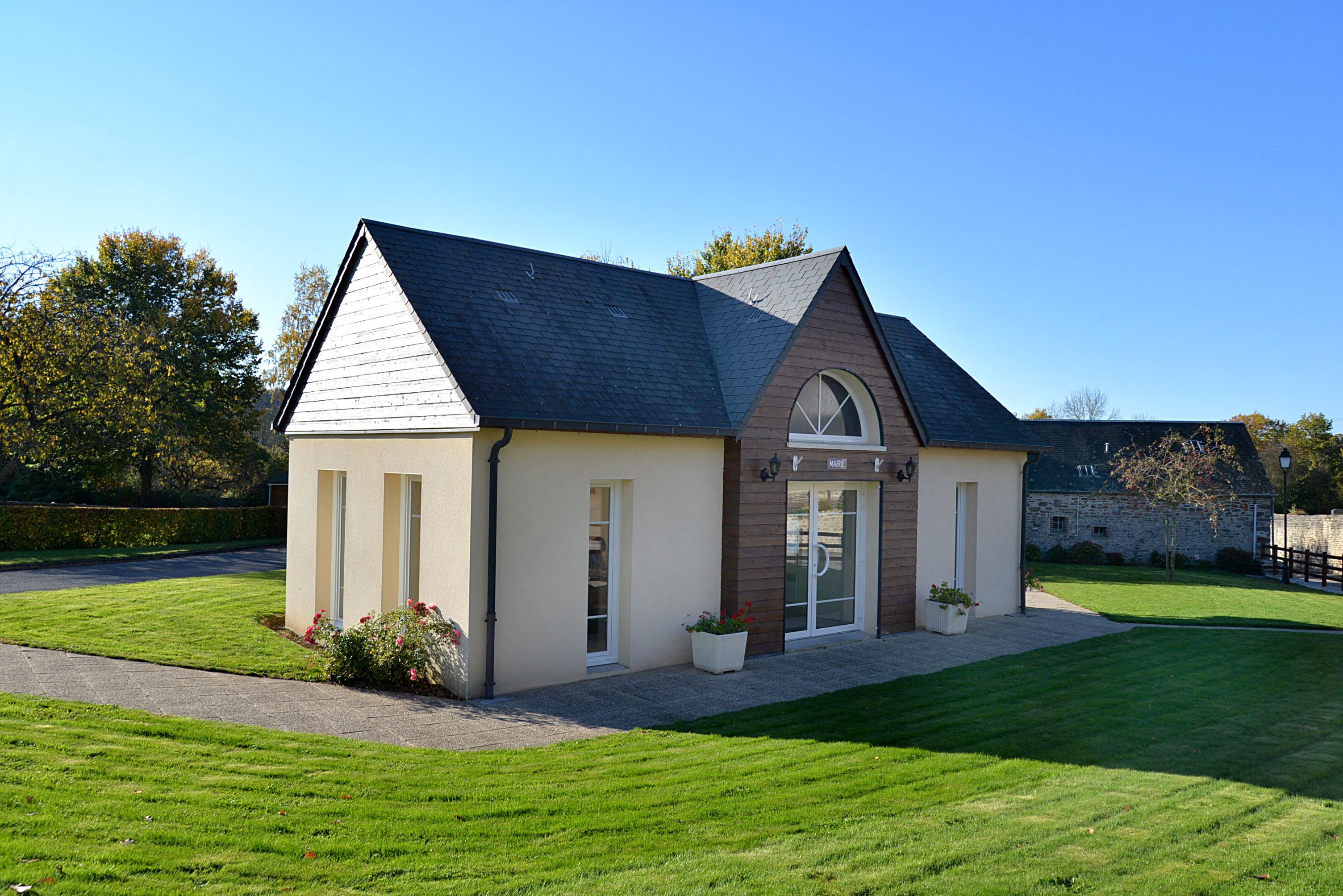 Le Vey (Calvados)